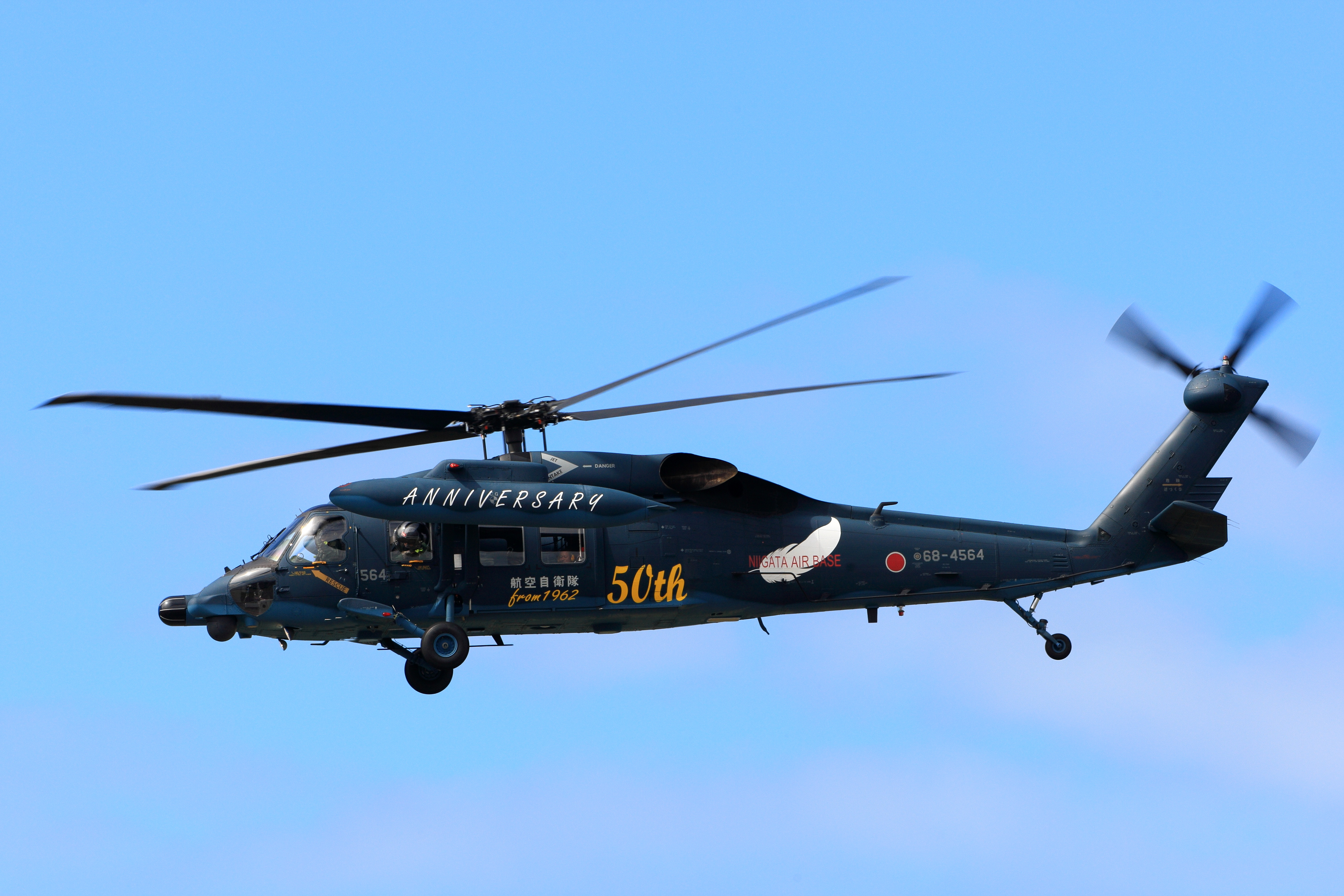 航空自衛隊新潟分屯基地創設50周年記念行事で救難飛行展示を行う､航空自衛隊新潟救難隊のUH-60J 新潟分屯基地創設５０周年記念塗装機